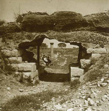 Porta de la ciutat romana de les ruïnes d'Empúries. Santiago Perdigó i Díaz Caneja (1921)